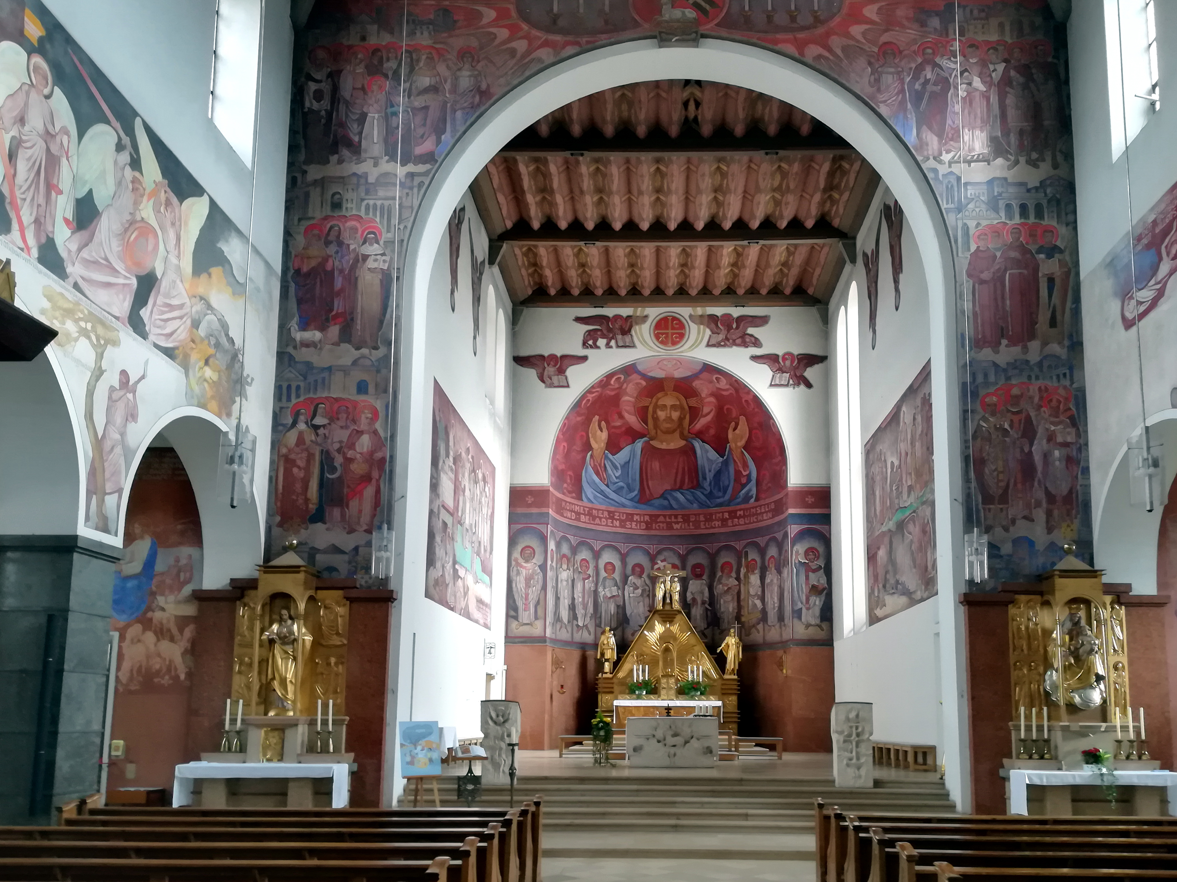 Die denkmalgeschützte katholische Pfarrkirche St. Anton steht in der Furtmayrstraße 22 im Kasernenviertel von Regensburg.